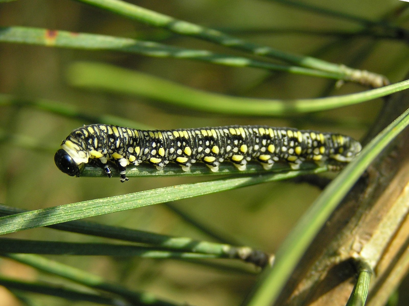 Diprion simile, Borecznik podobny, Polska